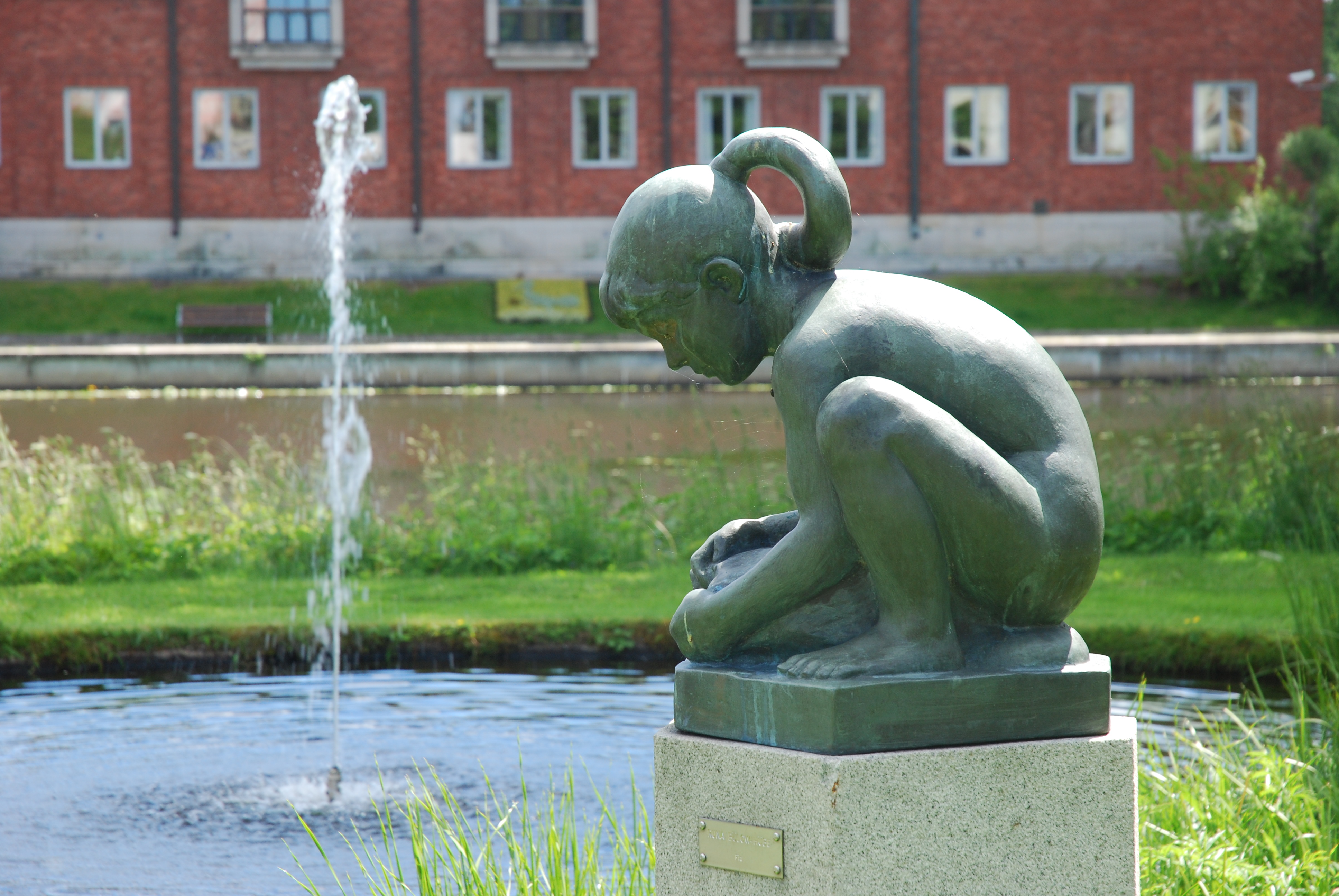 Runa Bülow-Hübe´s Pia, bronze, Tranås, Sweden